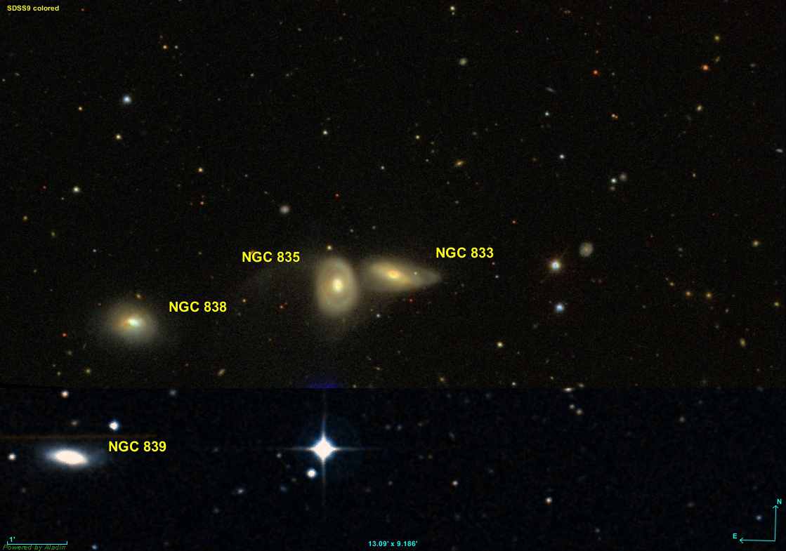 Image créée à l'aide du logiciel Aladin Sky Atlas du Centre de Données astronomiques de Strasbourg et des données fusionnées de DSS (Digitized Sky Survey) et de SDSS (Sloan Digital Sky Survey)